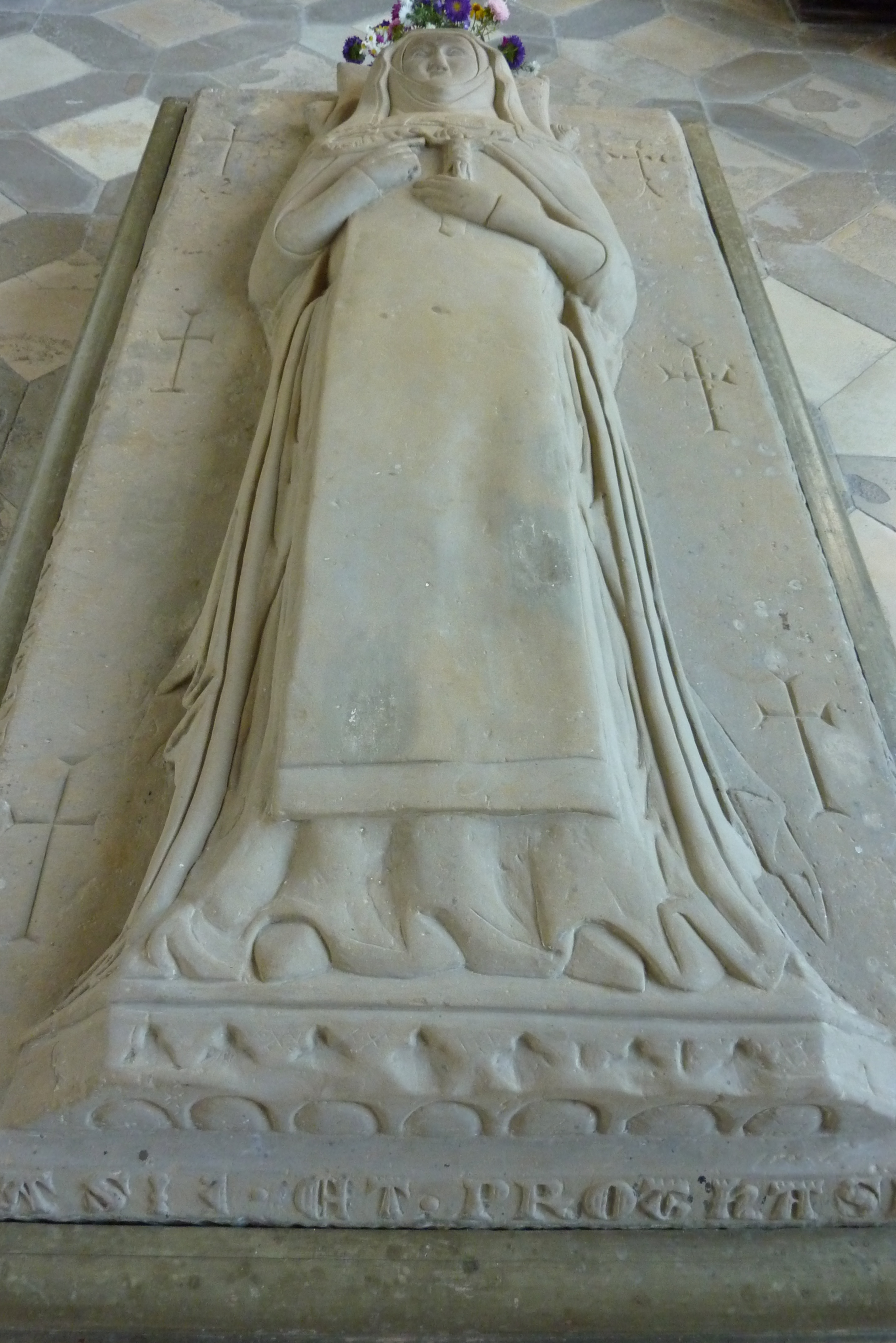 Klosterkirche Maria Medingen (Mariä Himmelfahrt) in Mödingen (Landkreis Dillingen an der Donau) des ehemaligen Dominikanerinnenklosters (heute Provinz Maria Medingen der Dillinger Franziskanerinnen), Grab von Margareta Ebner in der Ebnerkapelle